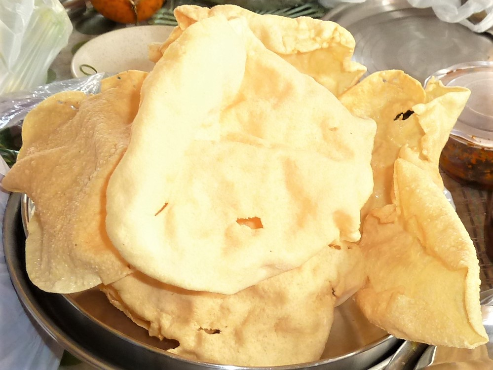 మినప అప్పడాలు